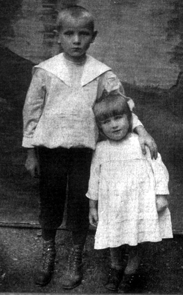 Яўген і Вера Скурко. Масква, 1922.